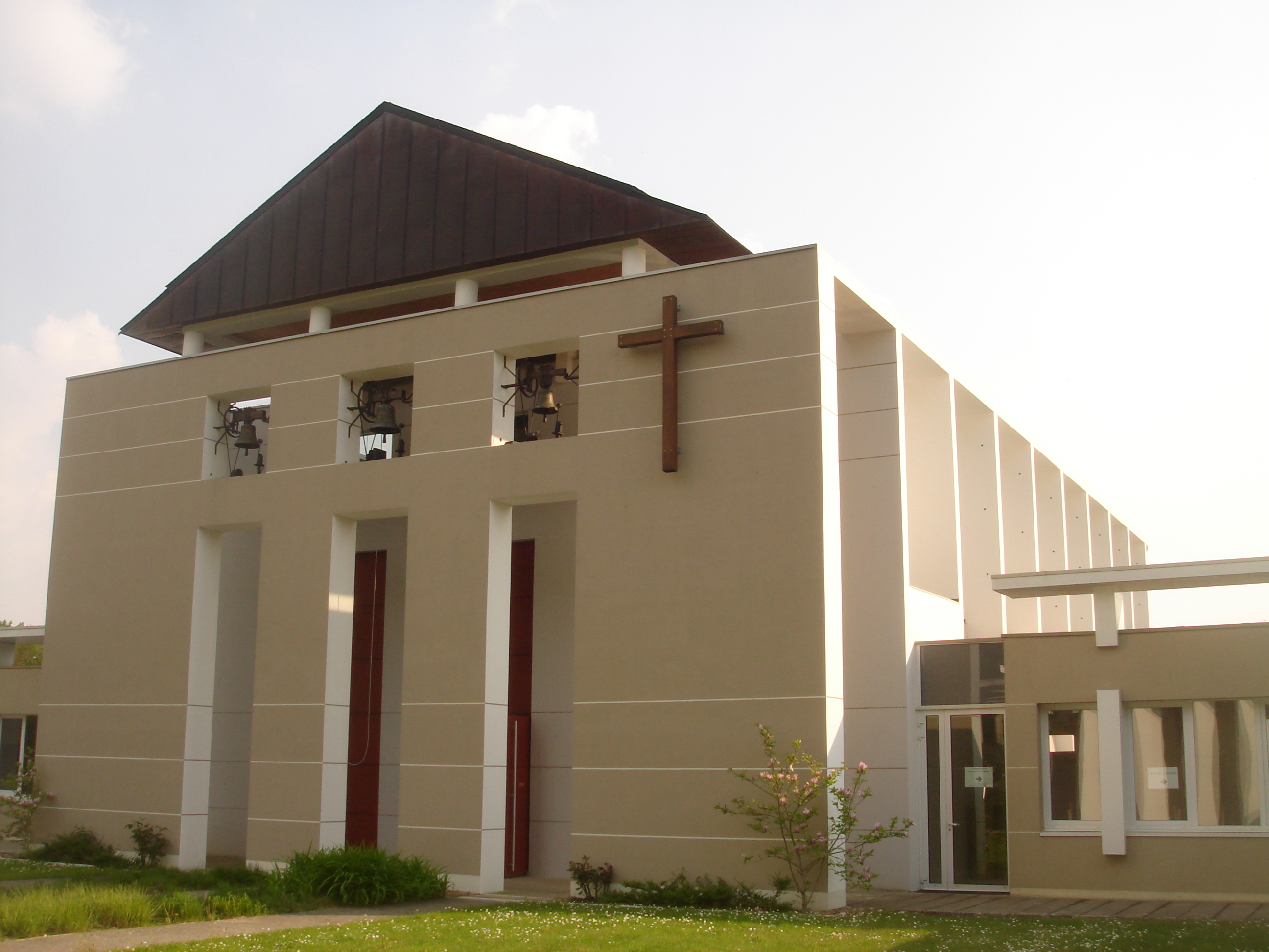 Monastère Notre-Dame de Bouzy-la-Forêt, Loiret, Centre, France